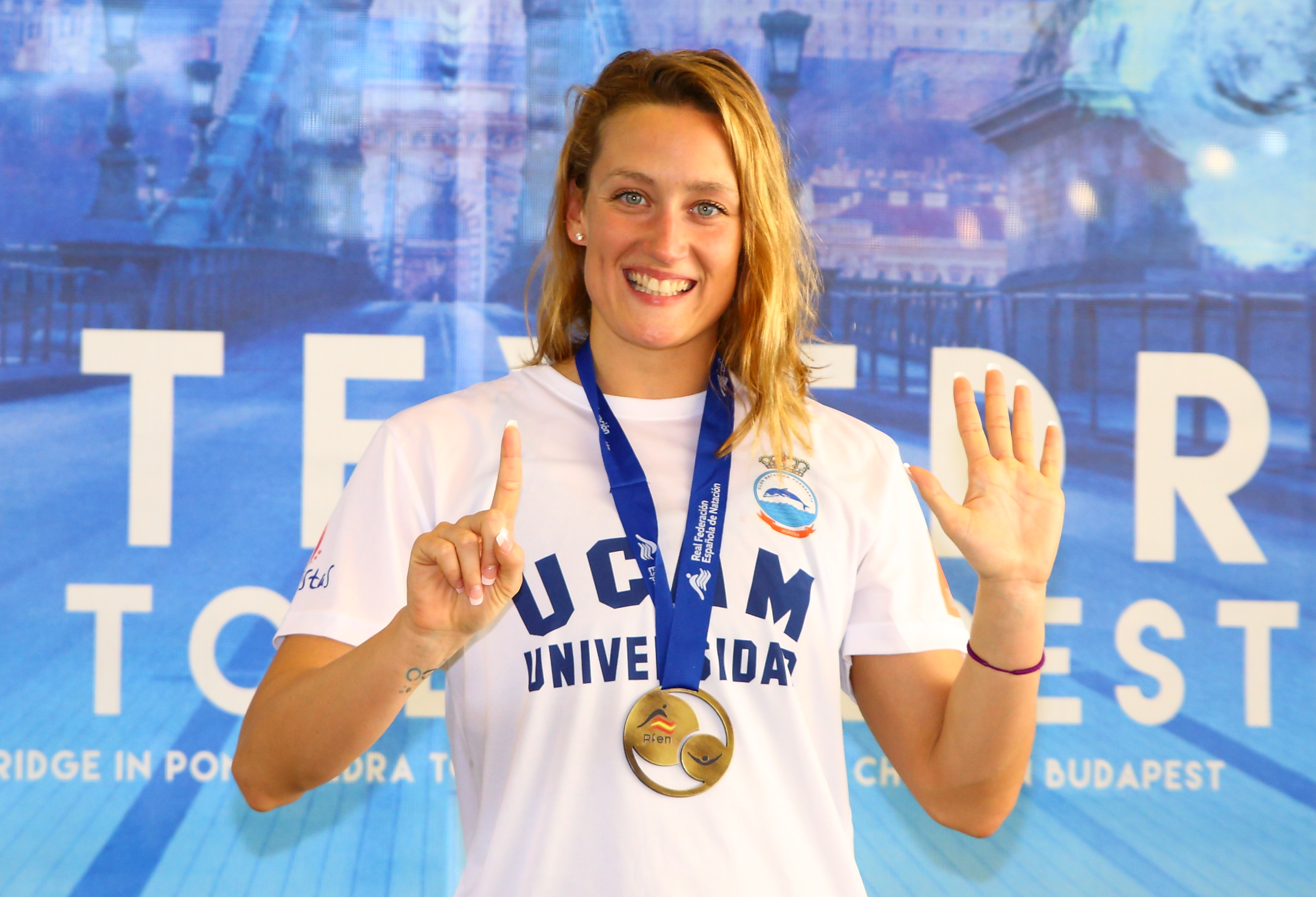 Campeonato de España Absoluto Open de Primavera de 2017 Pontevedra Última jornada, Martes 11 Seis mínimas para el mundial en Budapest